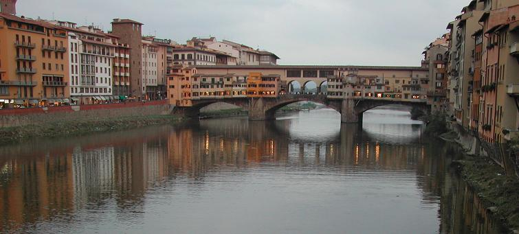 Ponte Vecchio a Firenze